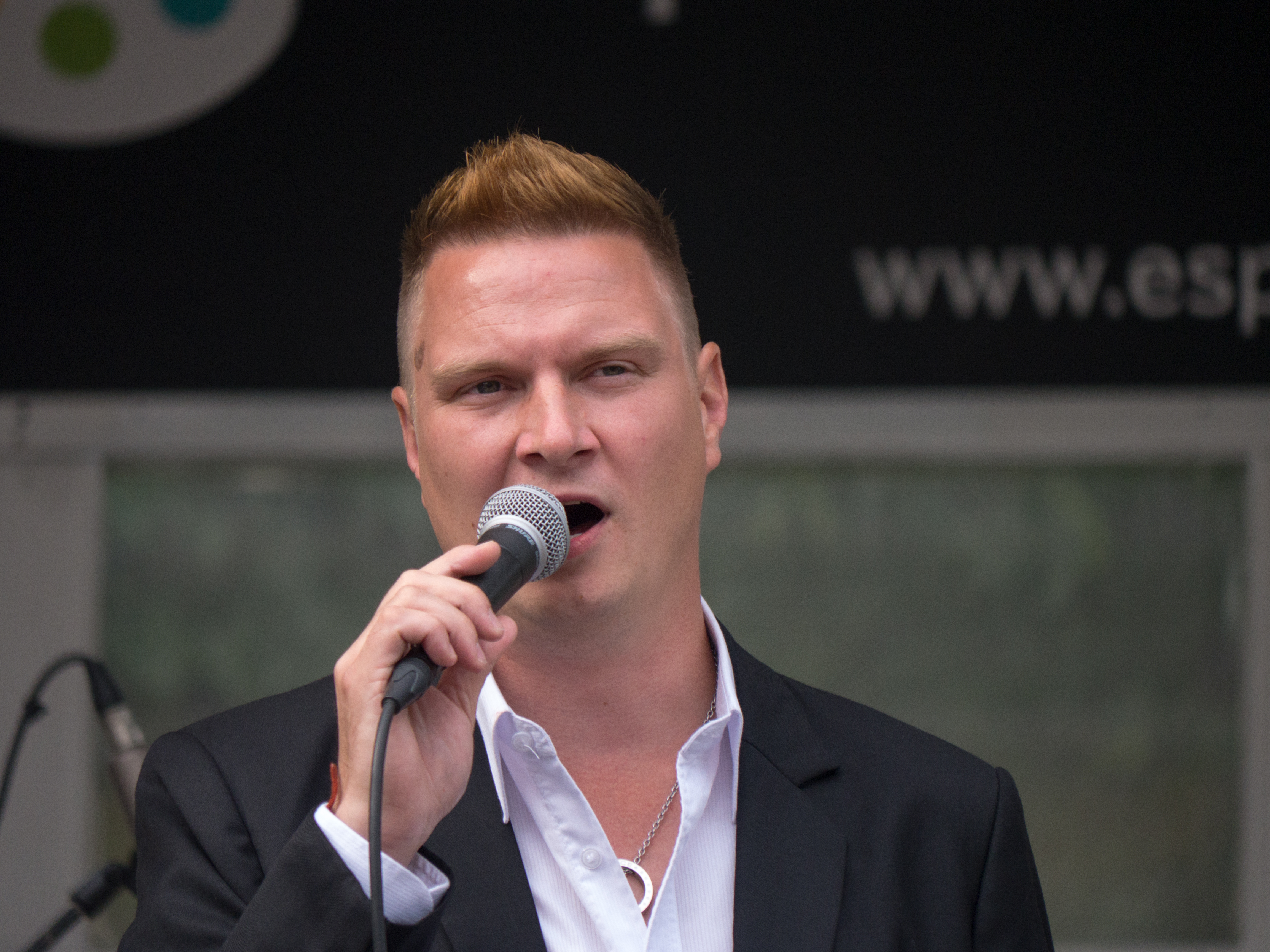 Jukka Hallikainen suomalainen laulaja